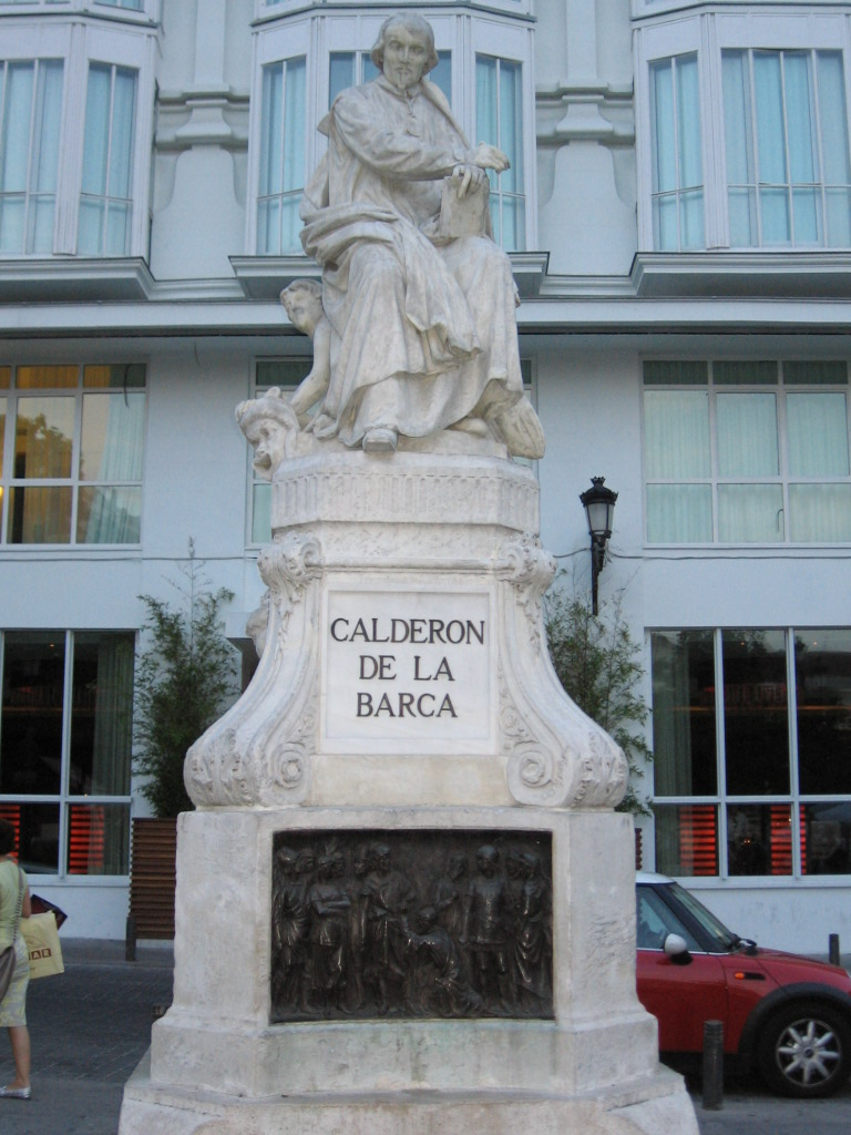 calderon de la barca,plaza santa ana,Madrid